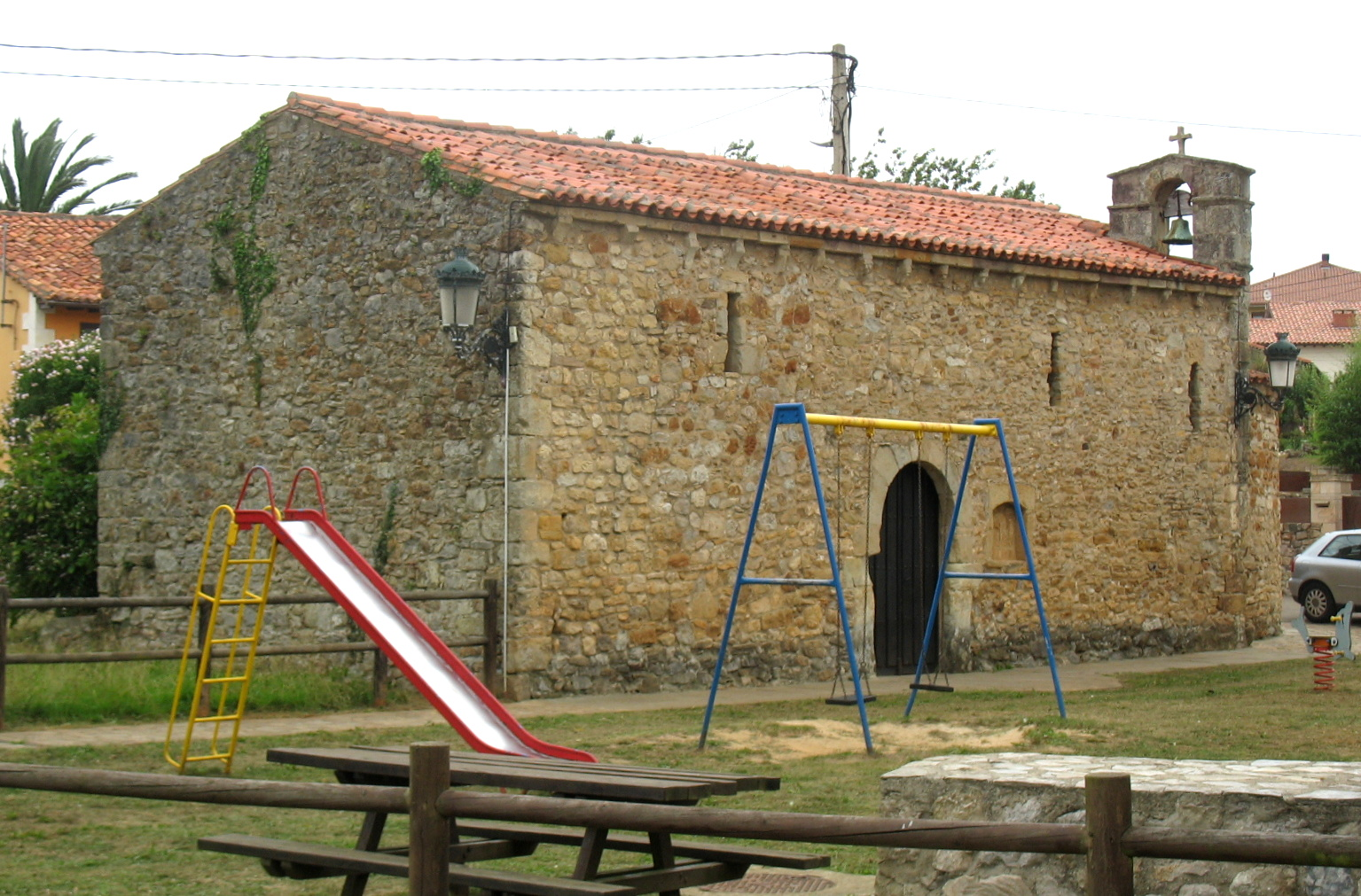 Ermita de San Bartolomé (Barrio de Caborredondo, Oreña, Alfoz de Lloredo, Cabntabria, España) S. IX